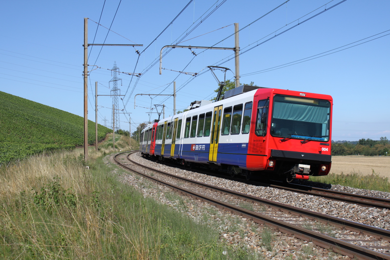 Les Bem 550 004-6 et 550 002-0 des CFF, en route de Genève-Cornavin vers La Plaine, passent la station de Russin.